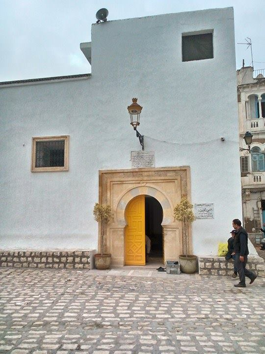 La médina de Tunis مدينة تونس العتيقة